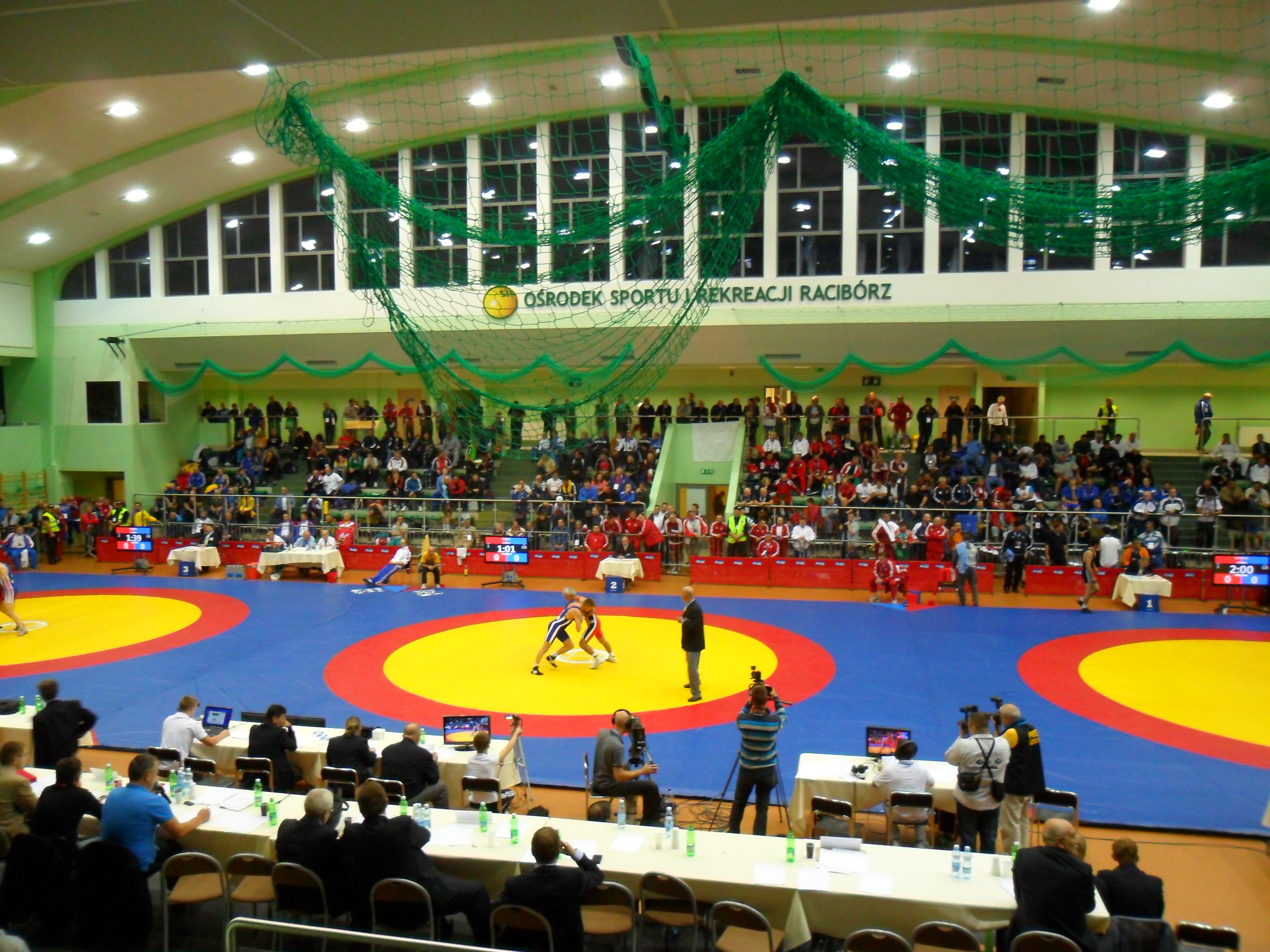 Mistrzostwa Świata weteranów w zapasach w stylu klasycznym, Racibórz 2011, dzień pierwszy zawodów (07.10.2011)